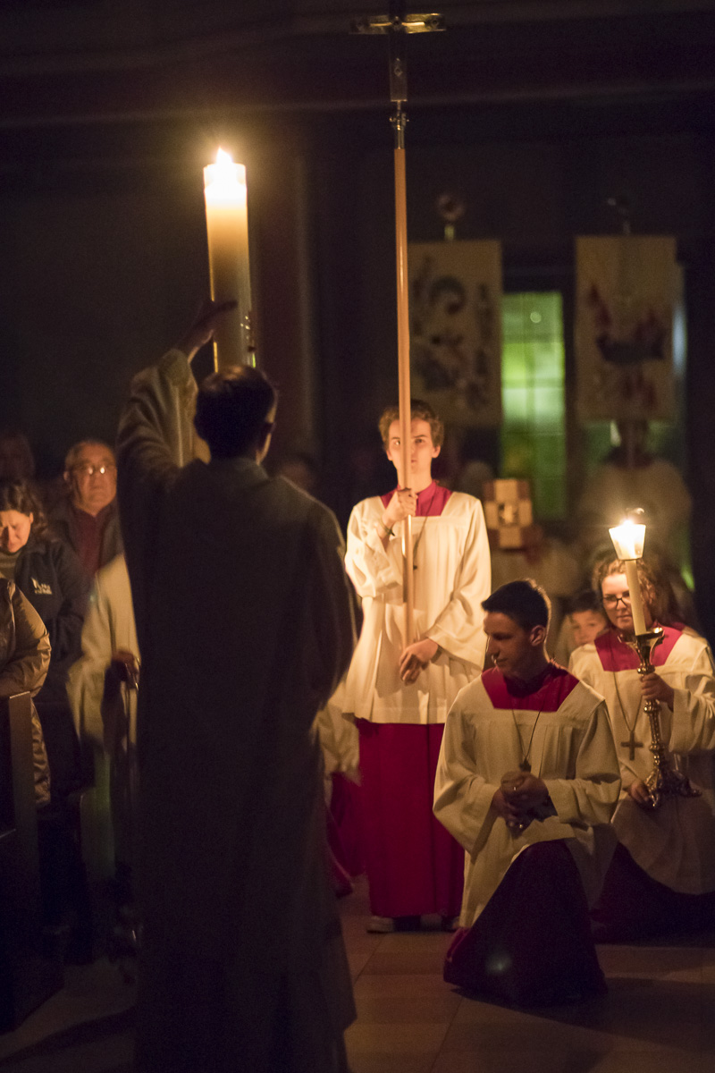 Lorsch, katholische Pfarrgemeinde St. Nazarius, Osternachtsliturgie: Diakon Andreas Debus erhebt die Osterkerze zum Lumen Christi.